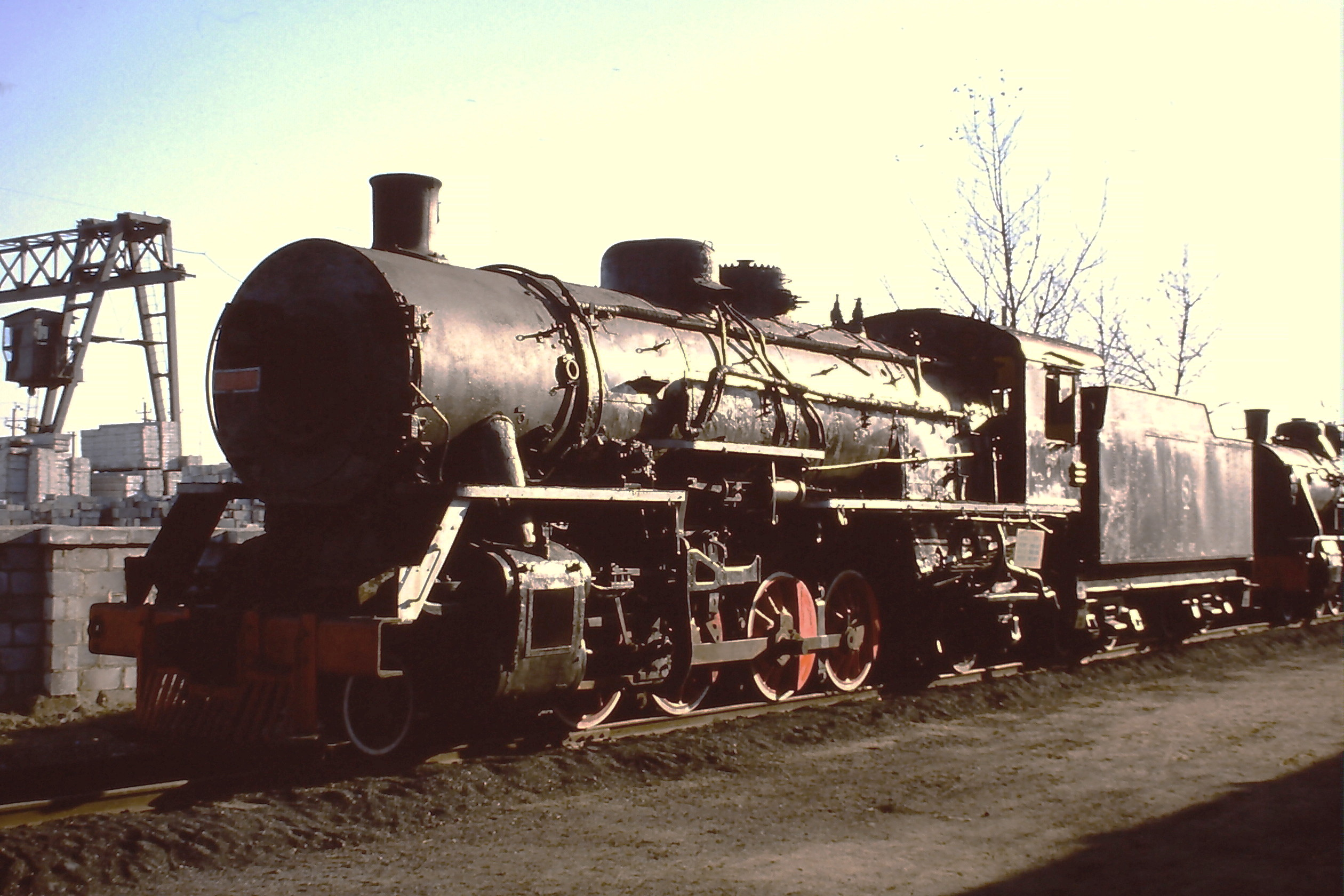 CNR JF2-2525 (Dampflokomotivmuseum Shenyang)